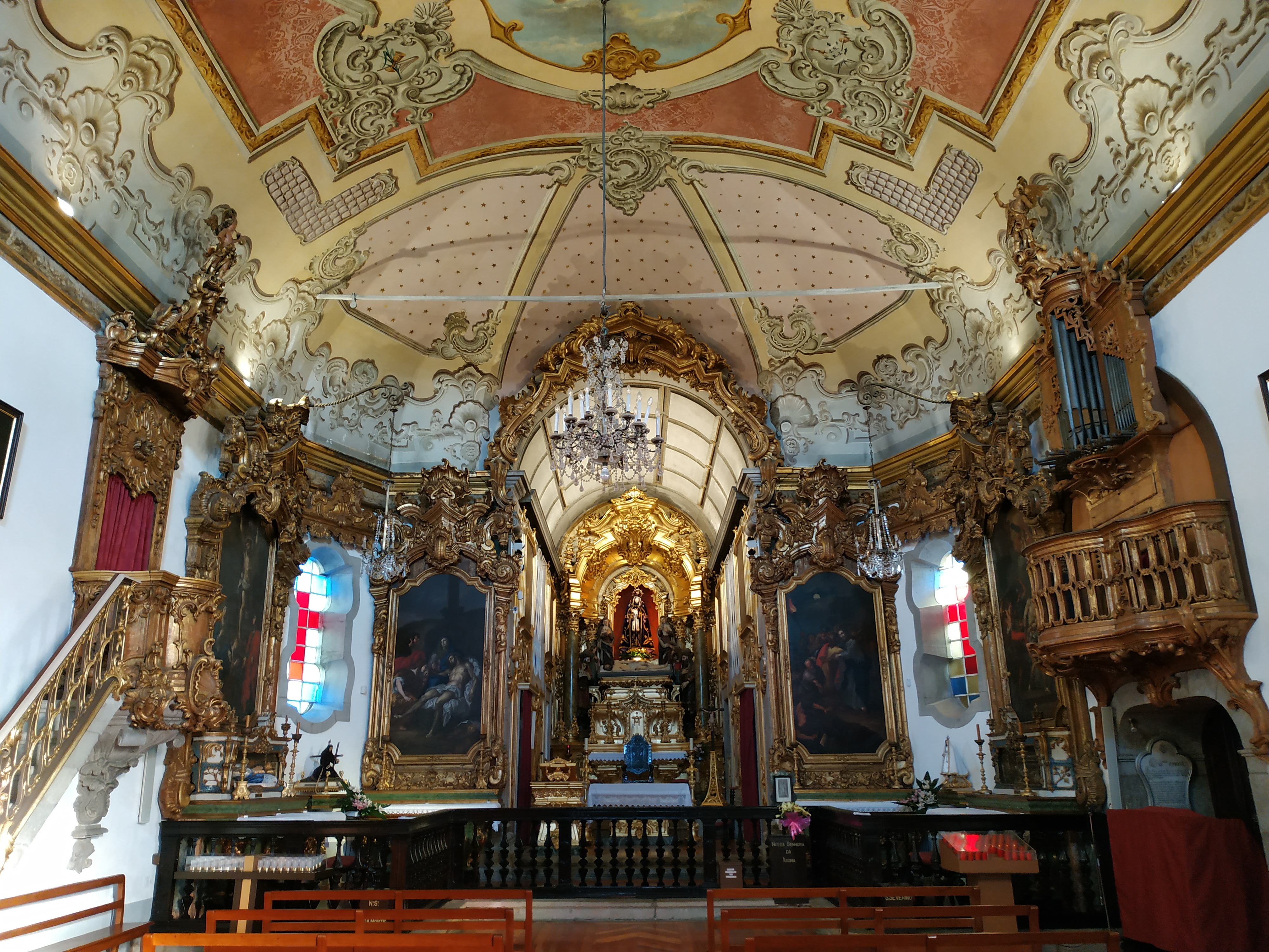 Viana do Castelo City Portugal